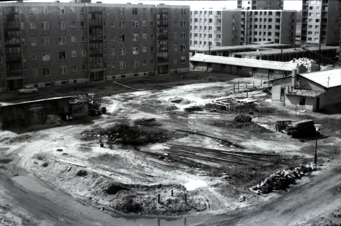 Az épülő József Attila lakótelep (Ezüst Sirály), Budapest